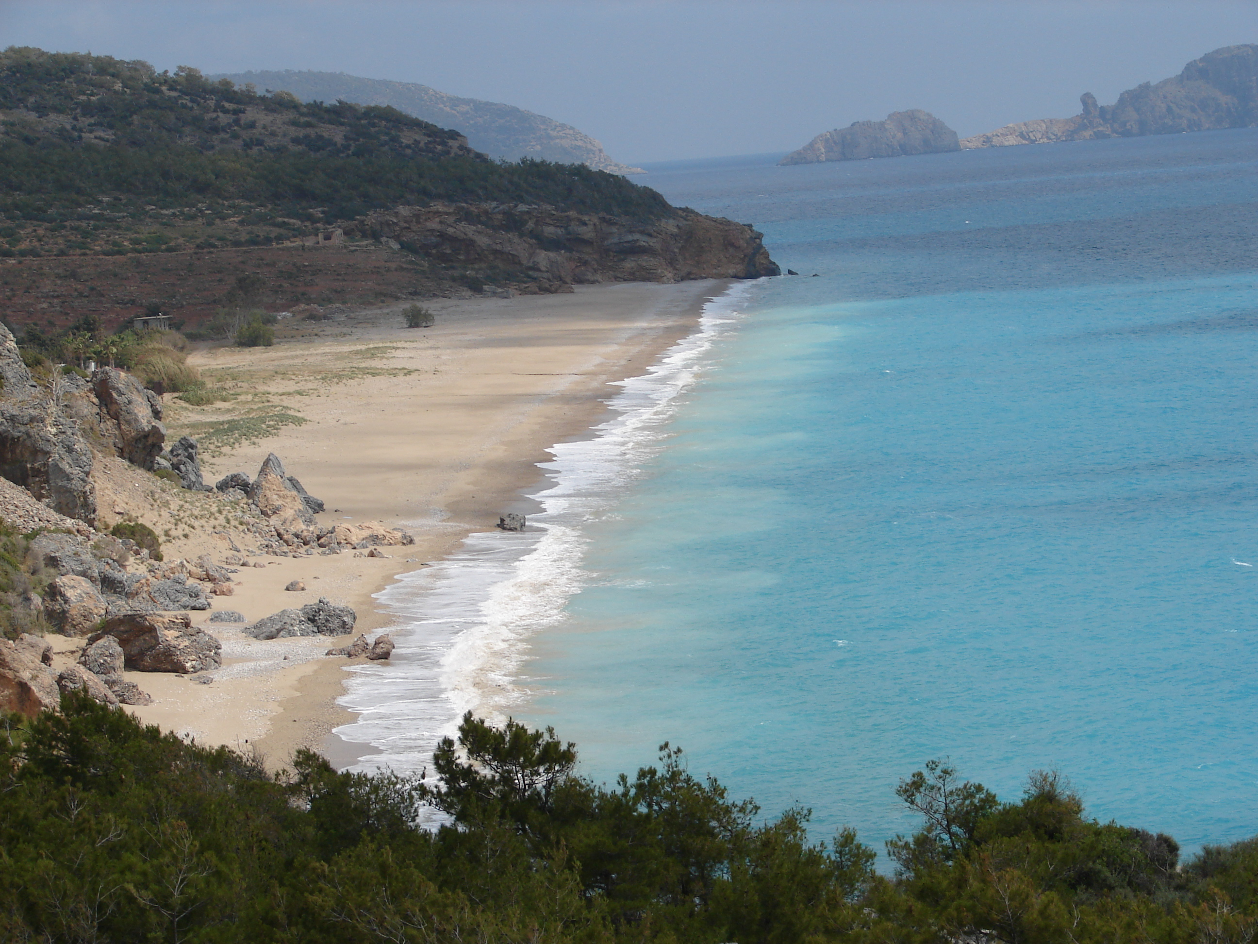 Muhteşem-Sıpahili